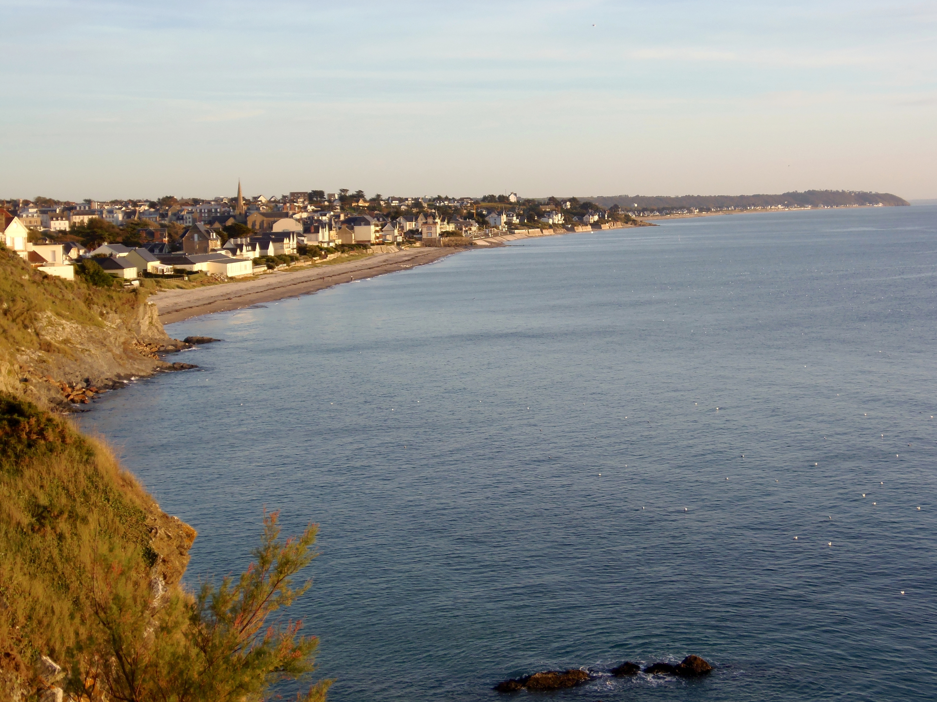 Saint-Pair-sur-Mer vu depuis le belvédère des Monts à Granville (Normandie, France).